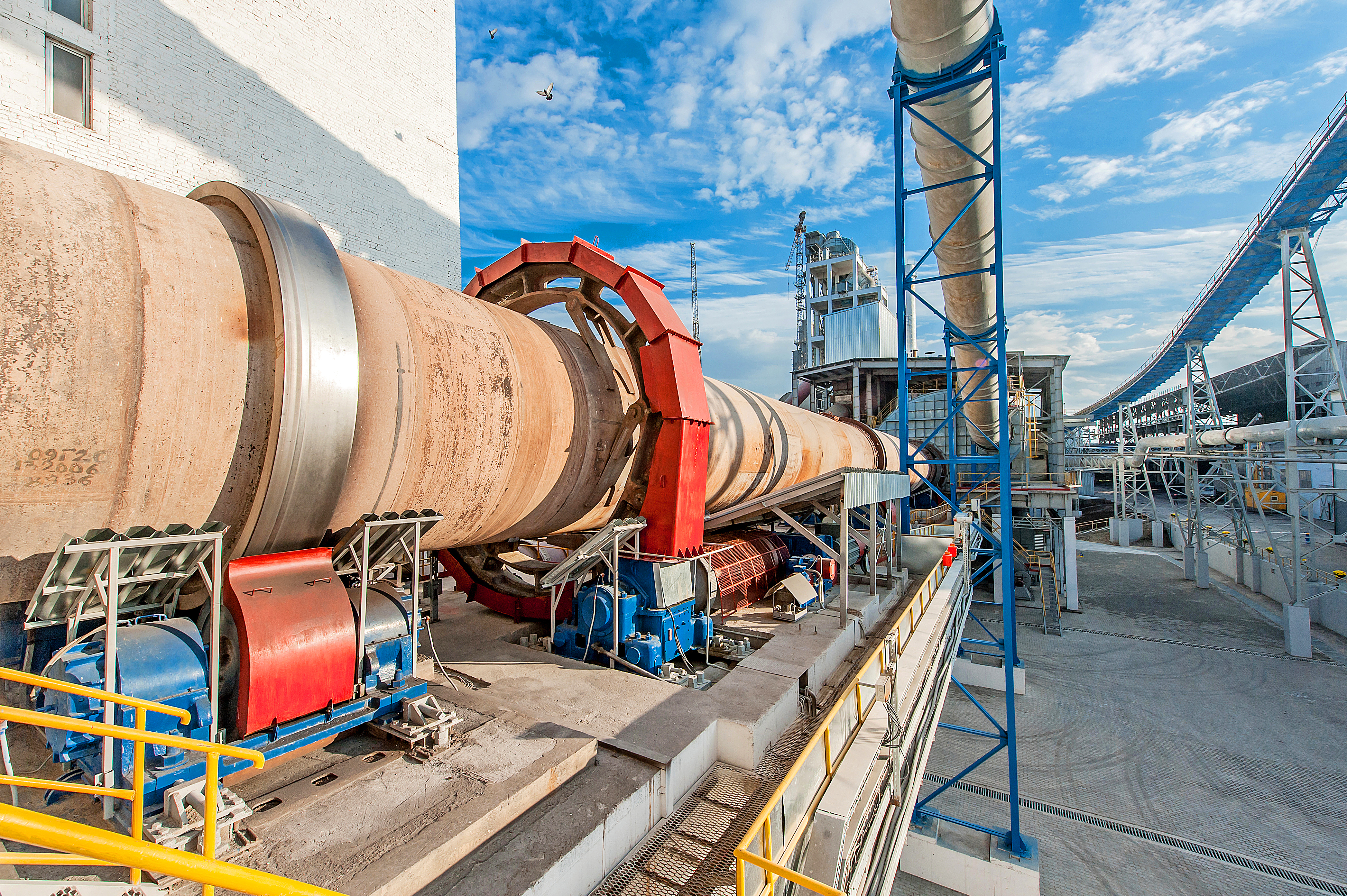 ПрАТ "Івано-Франківськцемент"_2